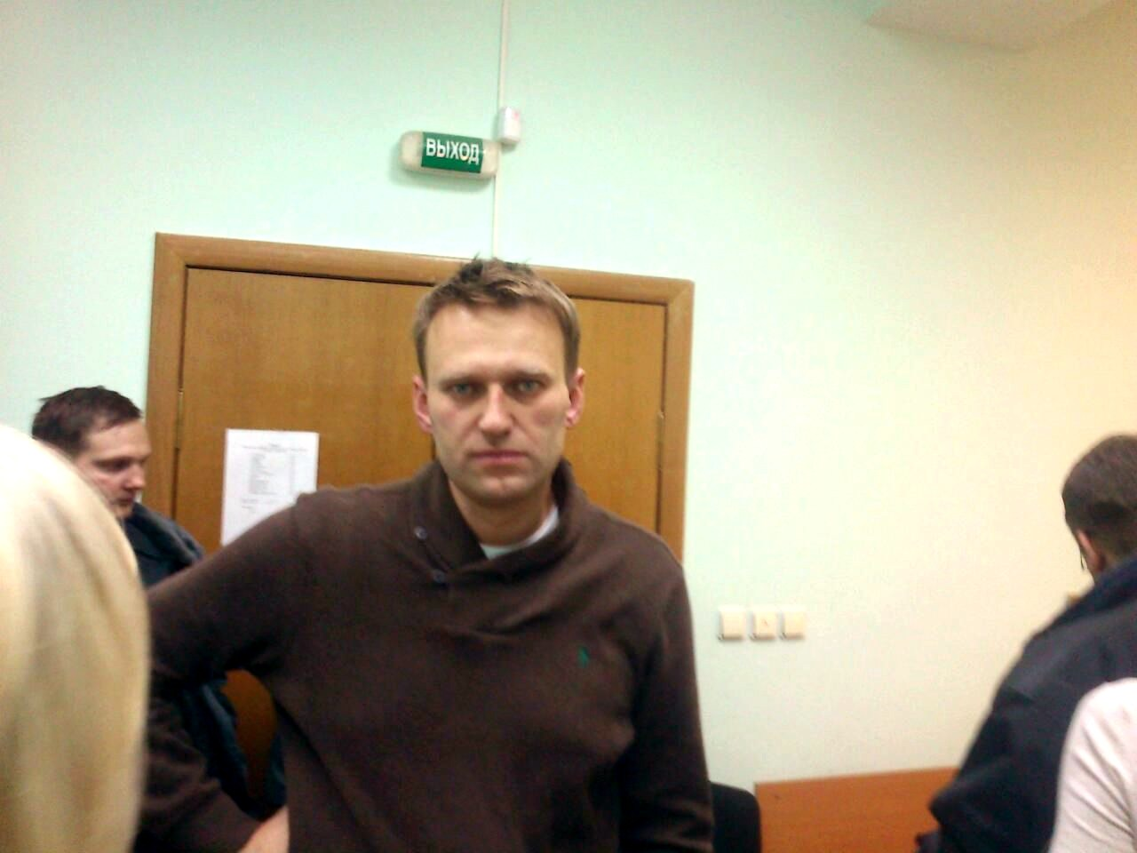 Навальный перед приговором. Грустный